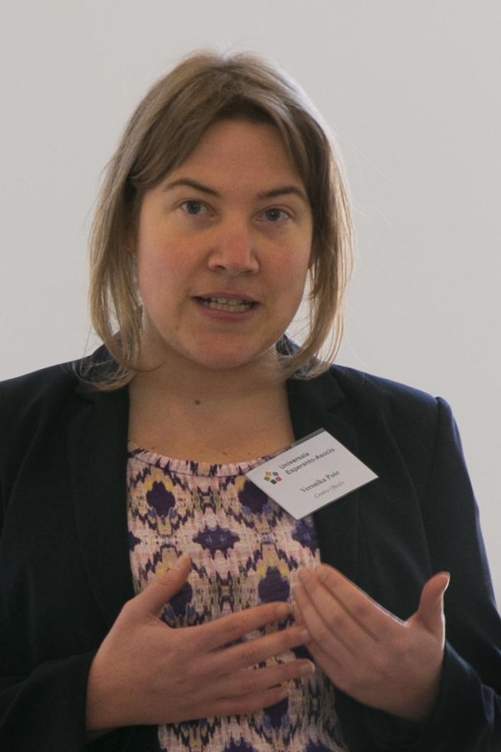 Veronika Poór prezentas la prelegantojn dum la 44a Malferma Tago de la Centra Oficejo de Universala Esperanto-Asocio, aprile 2016.